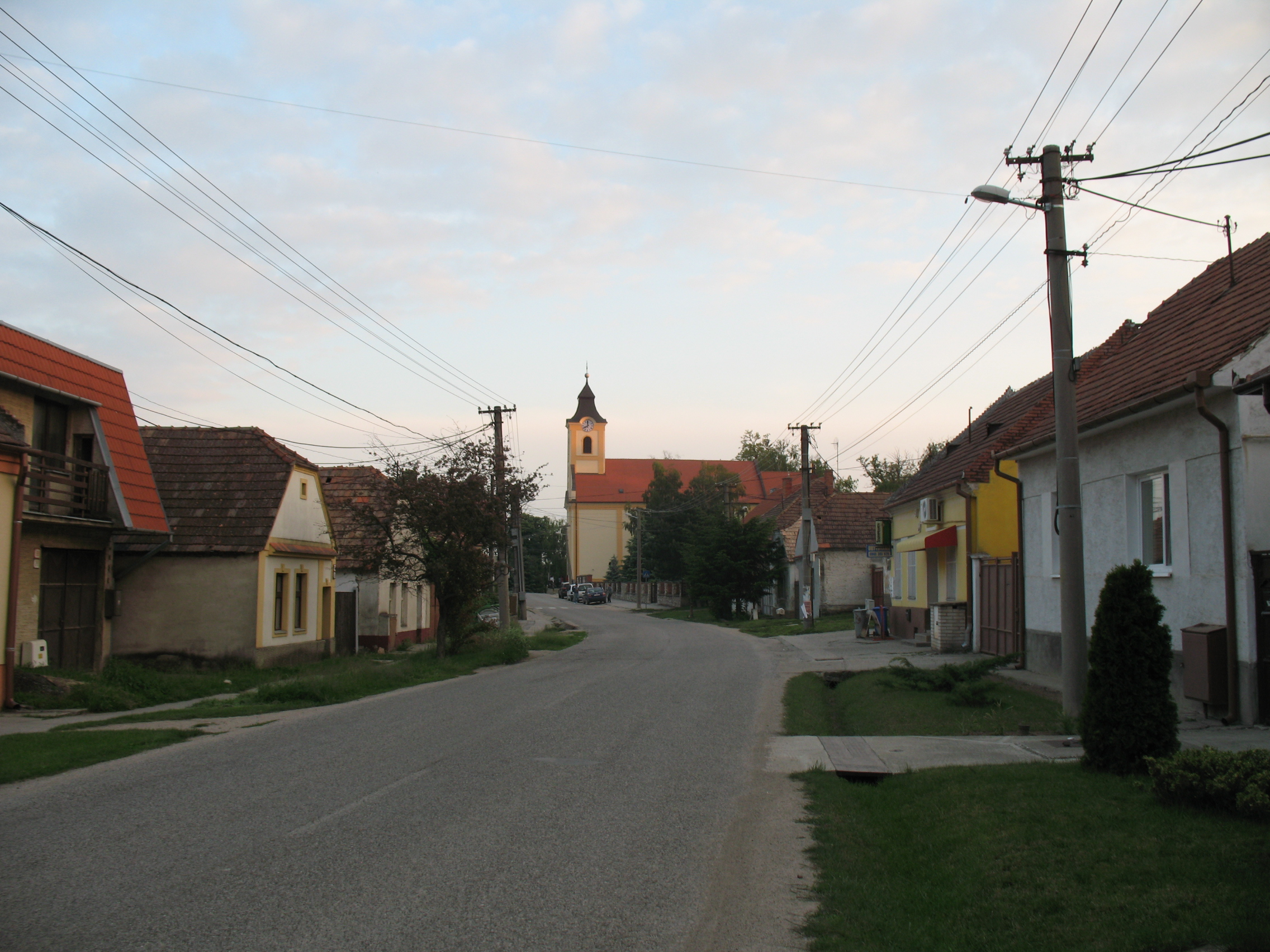 Bresztovány